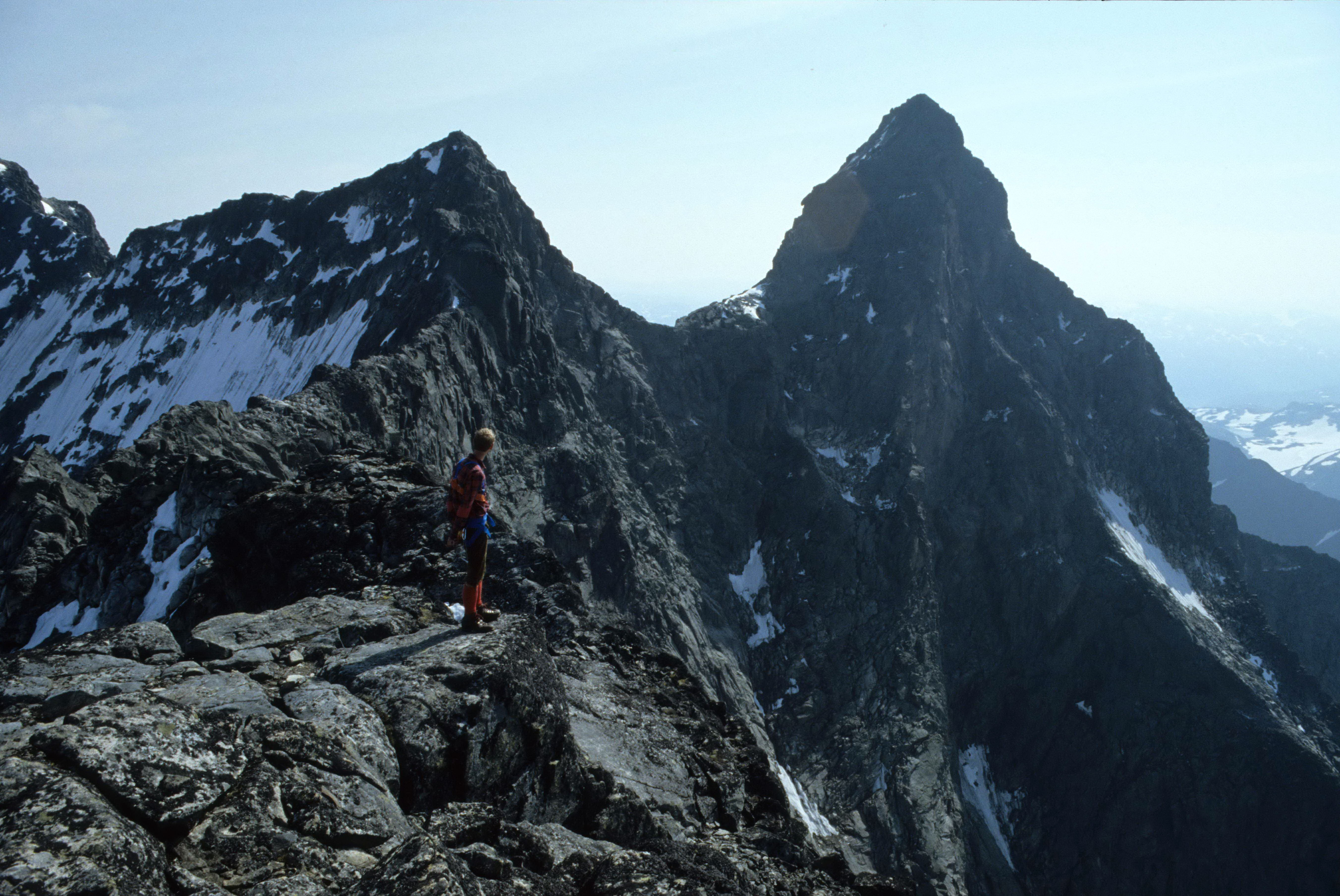 Klatrer på Skagastølsryggen